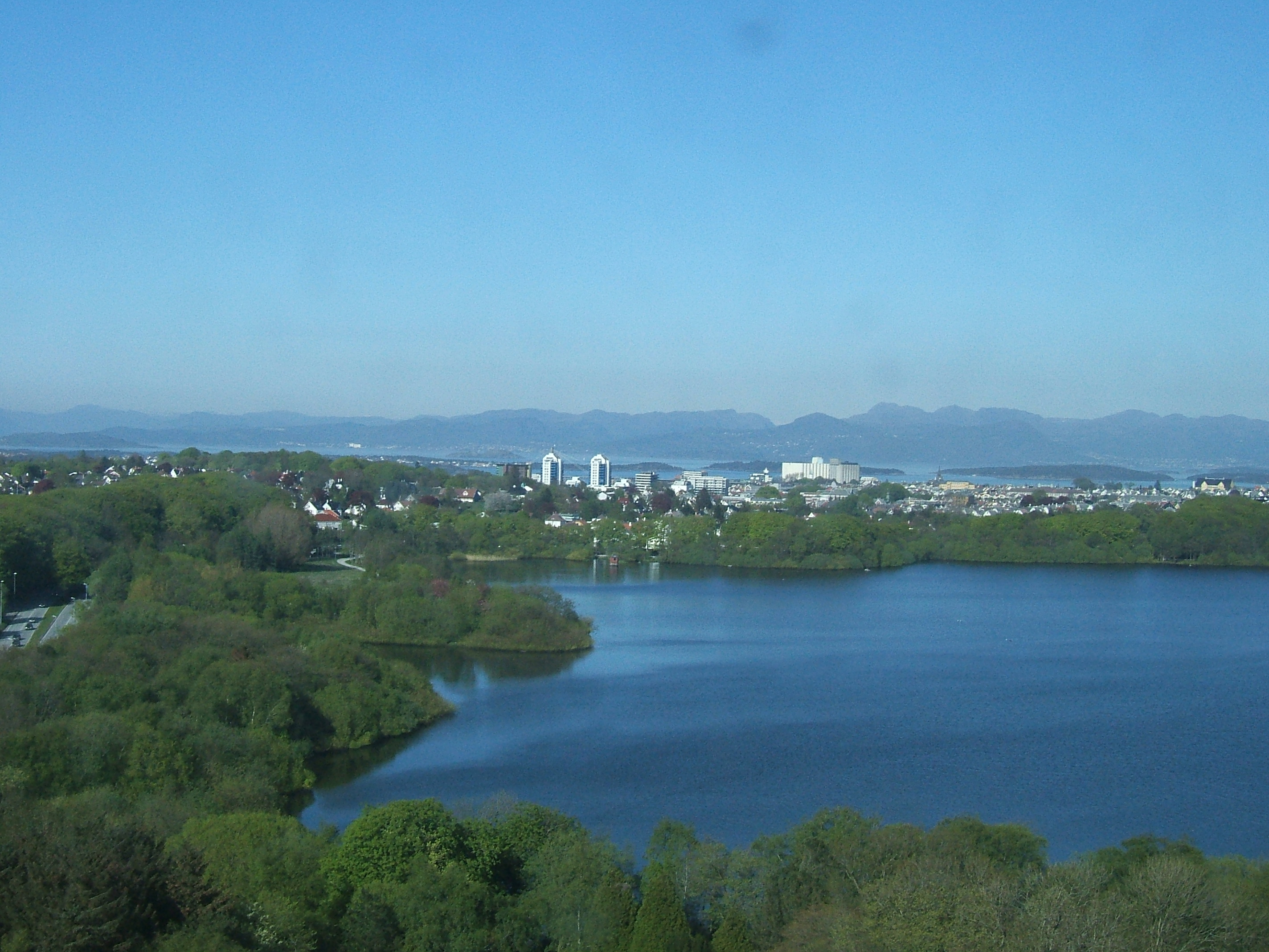 Mosvatnet, Stavanger